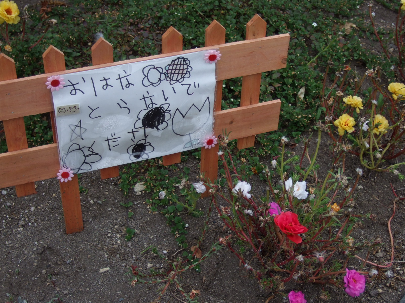 この貼り紙を書くに至った経過が気になる…